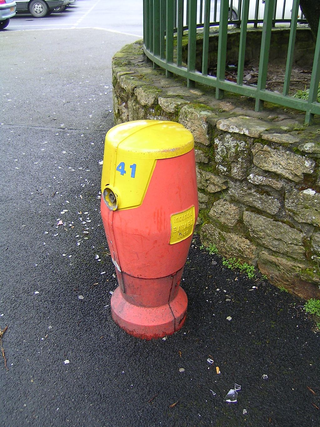 Bouche d'incendie, en Bretagne Photo personnelle (own work) de Marianna